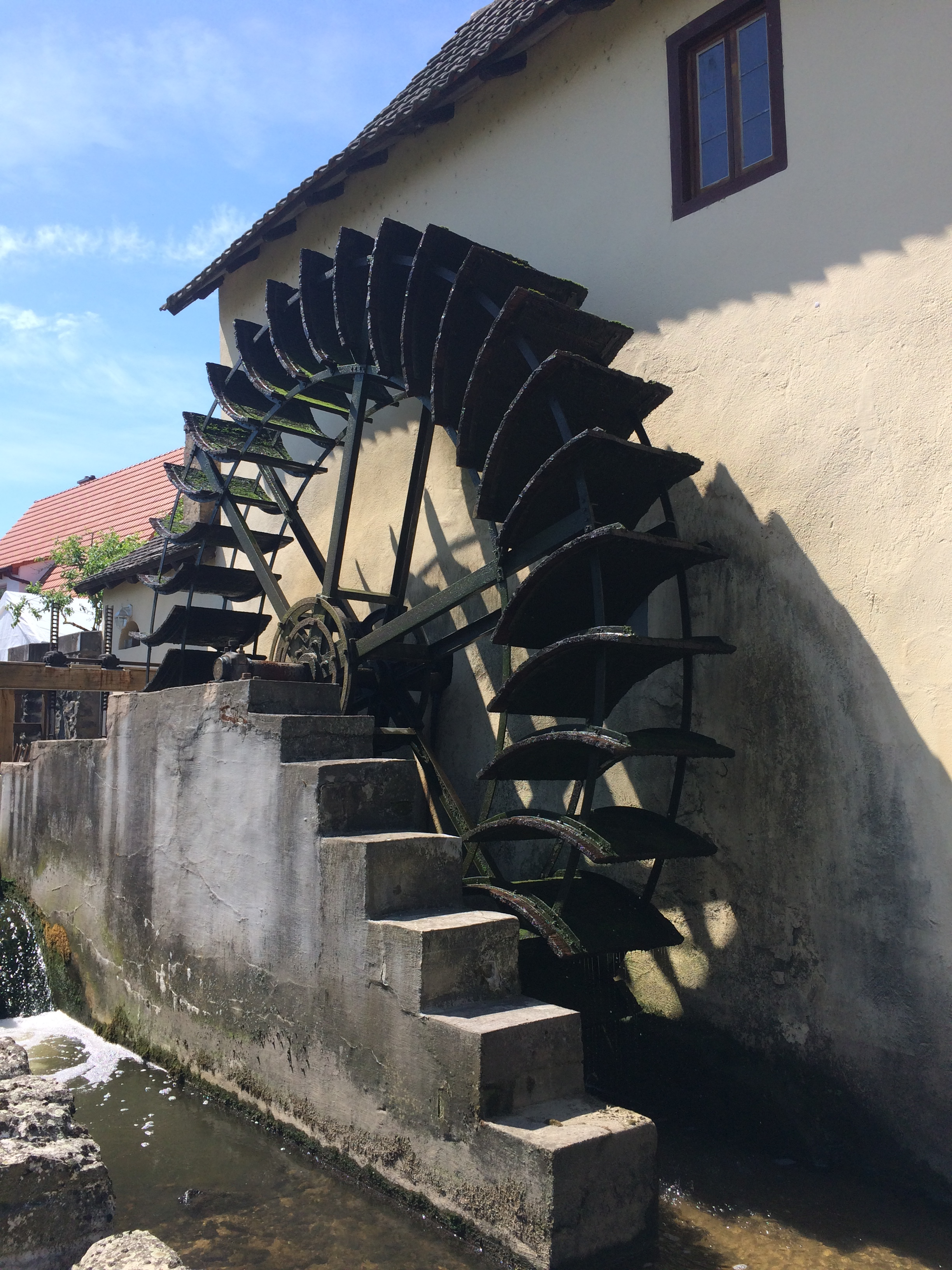 Ehemalige Brückenmühle in Mühlheim am Main